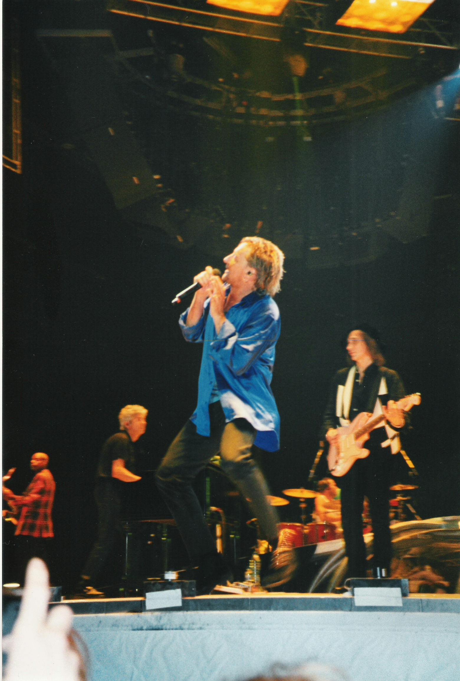 Rod Stewart en concert au Flanders Expo de Bruxelles Belgique 1995